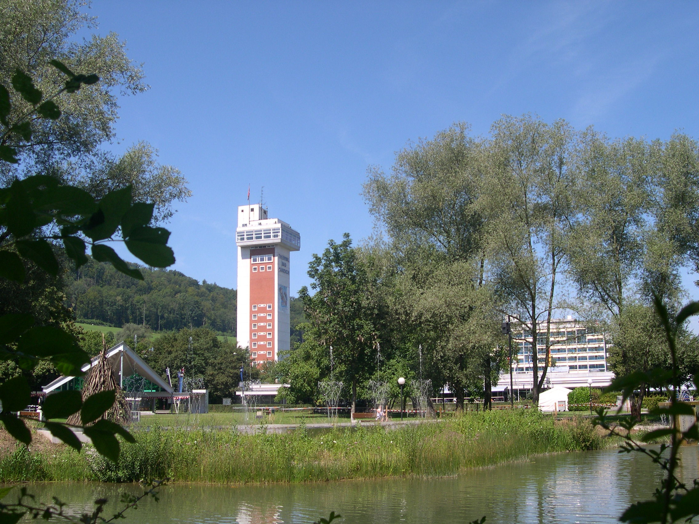 Blick vom Kurpark auf den Zurziturm und die RehaClinic in Zurzach